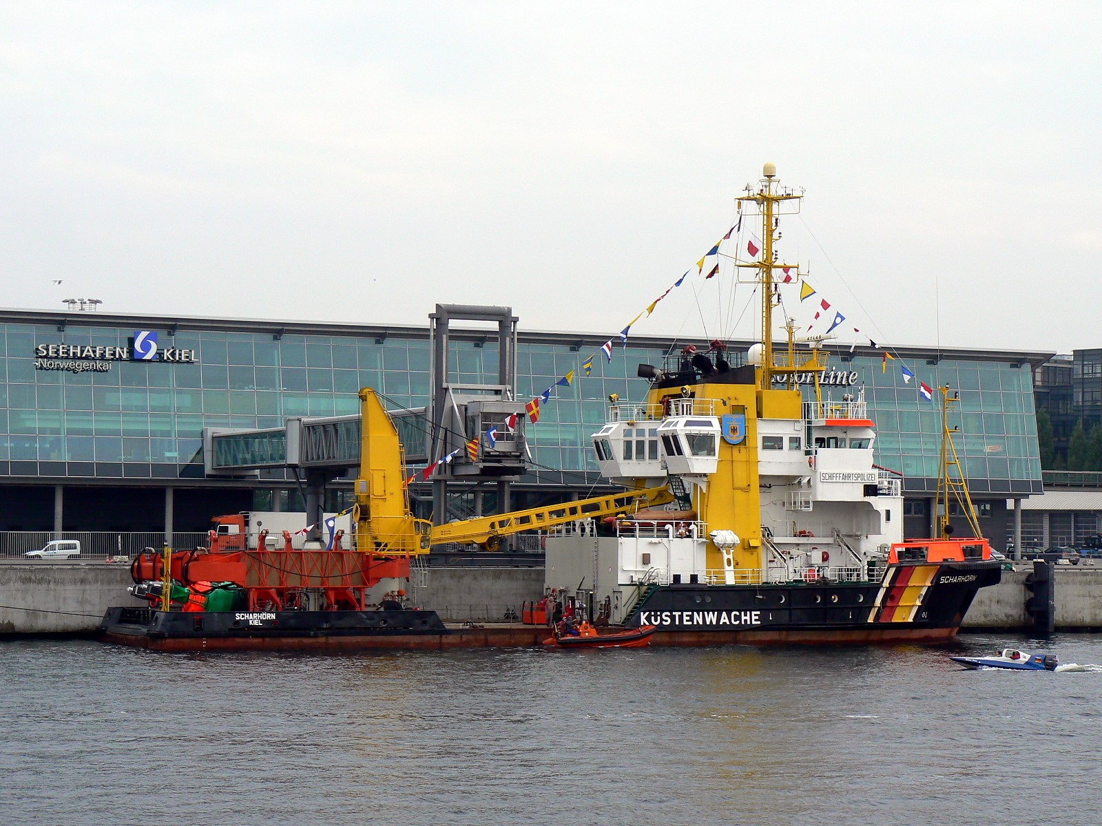 Mehrzweckschiff Scharhörn im Kieler Hafen. IMO number : 7349455 Call Sign : DGOQ Gross tonnage : 1305 Year of build : 1974